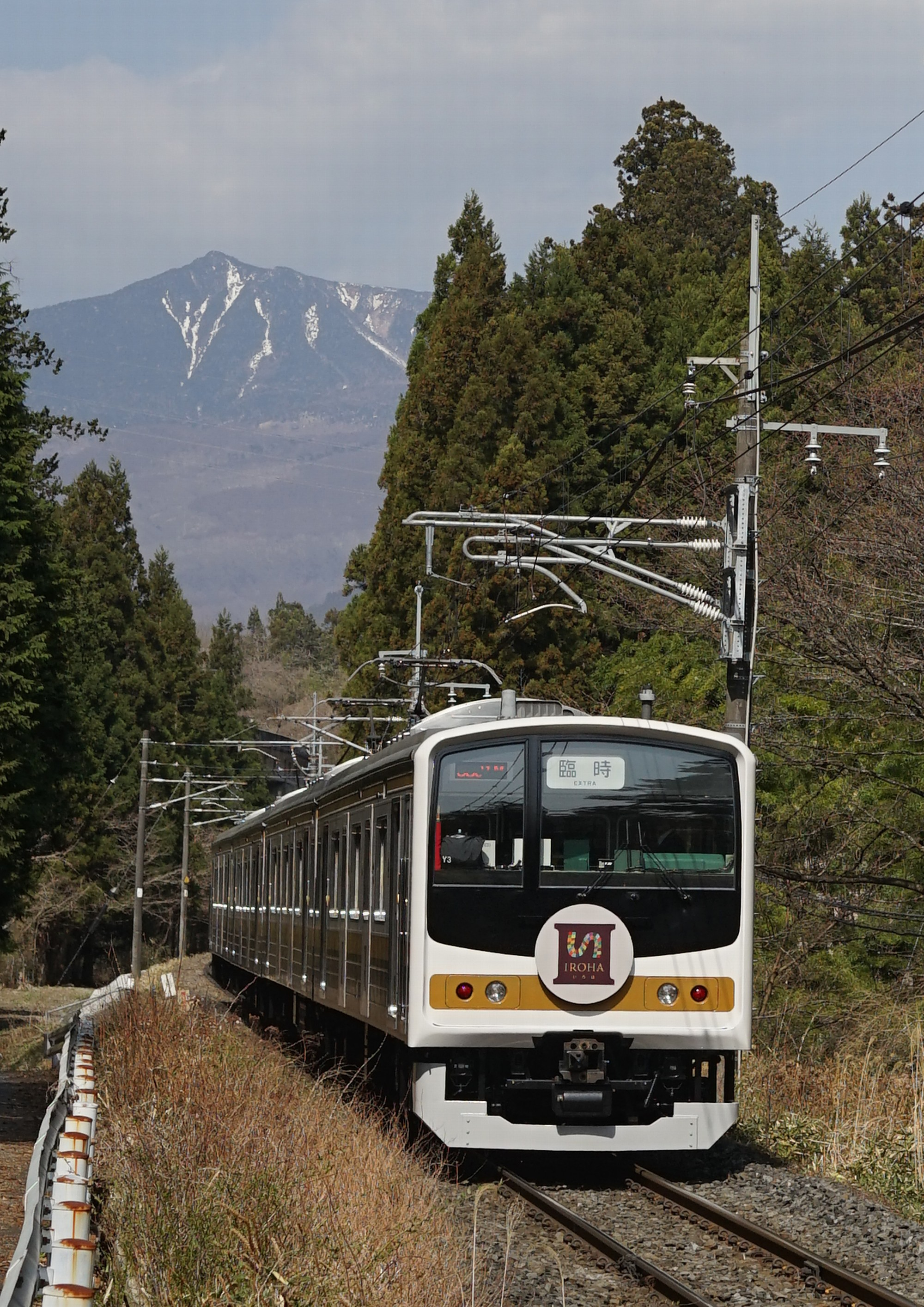 観光車両「いろは」